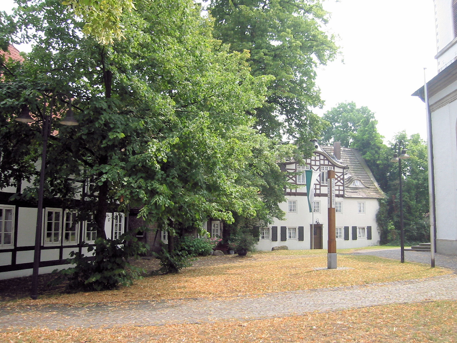 Verl, Blick auf den St.-Anna-Kirchplatz This is the photograph of an architectural monument. It is part of the list of cultural monuments of Verl, no. 1